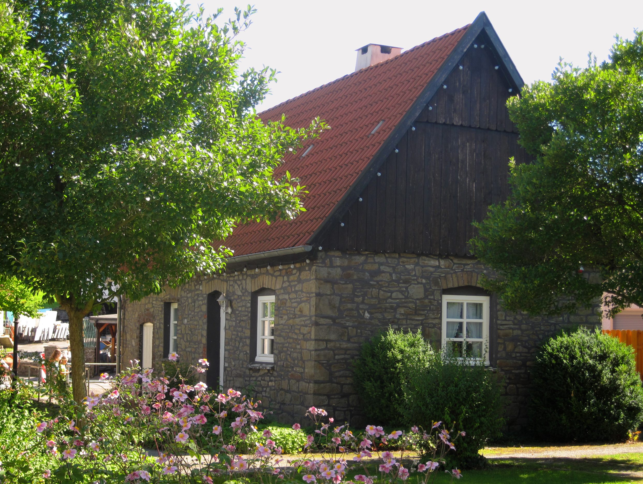 Balve-Garbeck, Karrenstraße 3, ehemalige Schule. Denkmal seit 8. Mai 1984, Nr. 66.